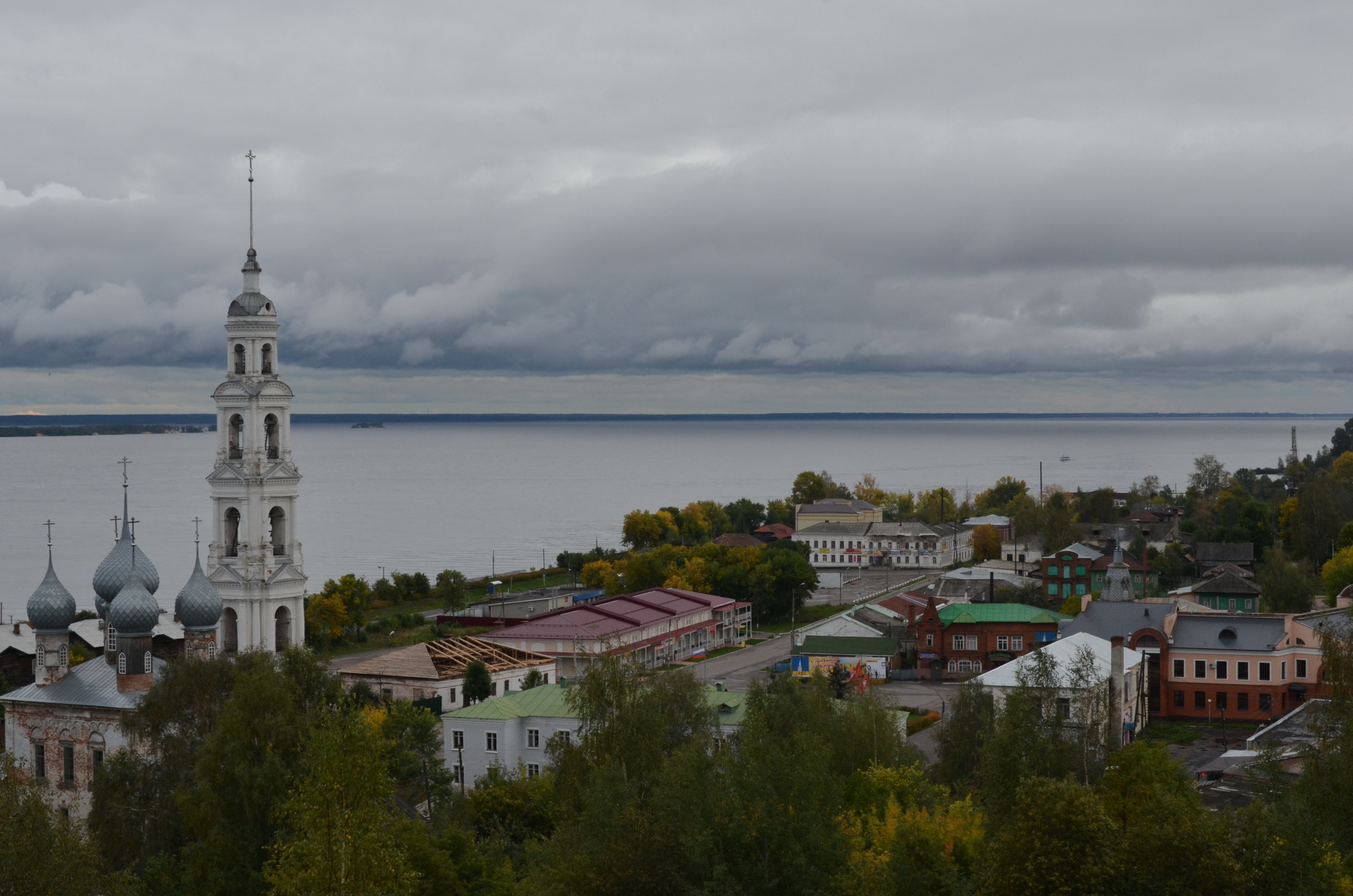 Исторический центр г.Юрьевец (Ивановская область, Юрьевец, старая часть города)